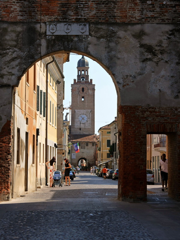 Porta di accesso al centro storico di Castelfranco Veneto, provenendo da Vicenza